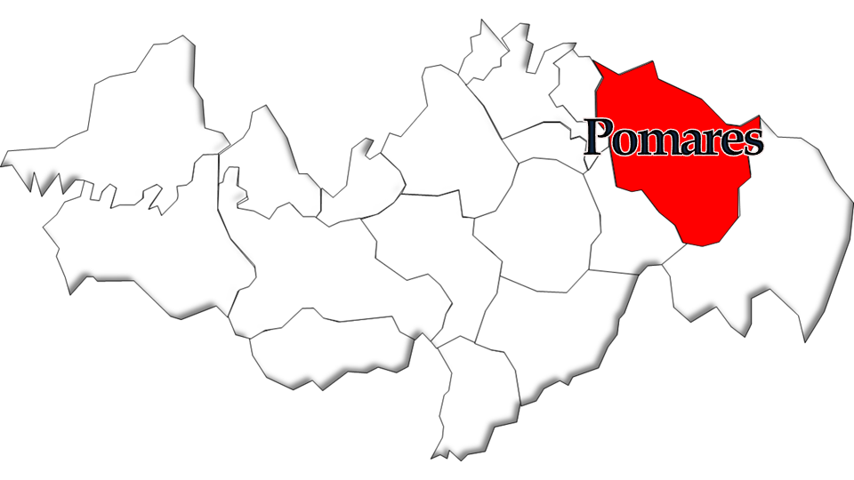 População